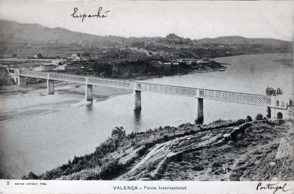 Valença - Ponte Internacional